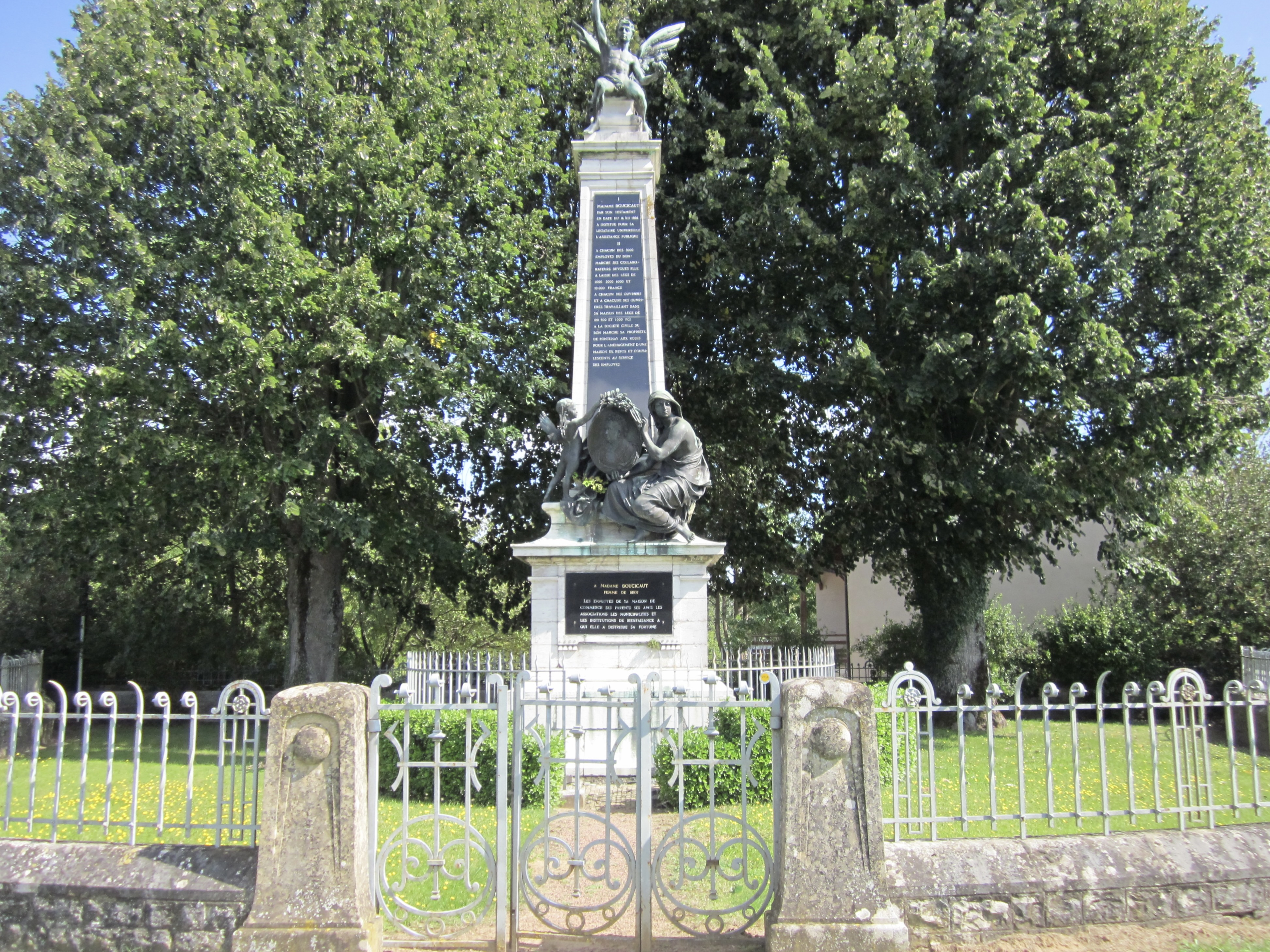 Verjux - le Monument à Mme. Boucicaut en remerciement de la création d'un pont sur la Saône qui désenclavait son pays natal.